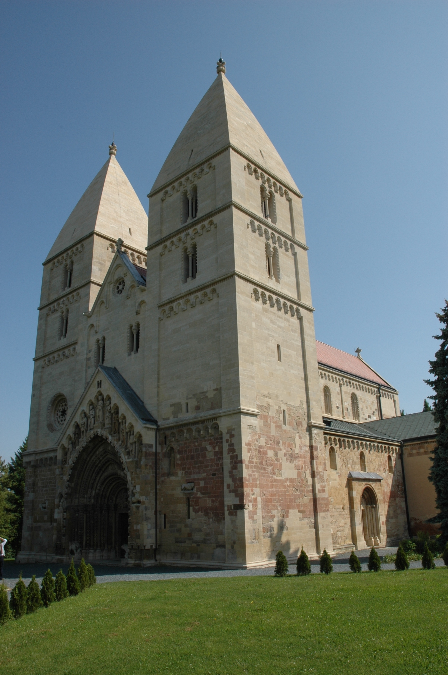 Abteikirche in Ják, Ungarn